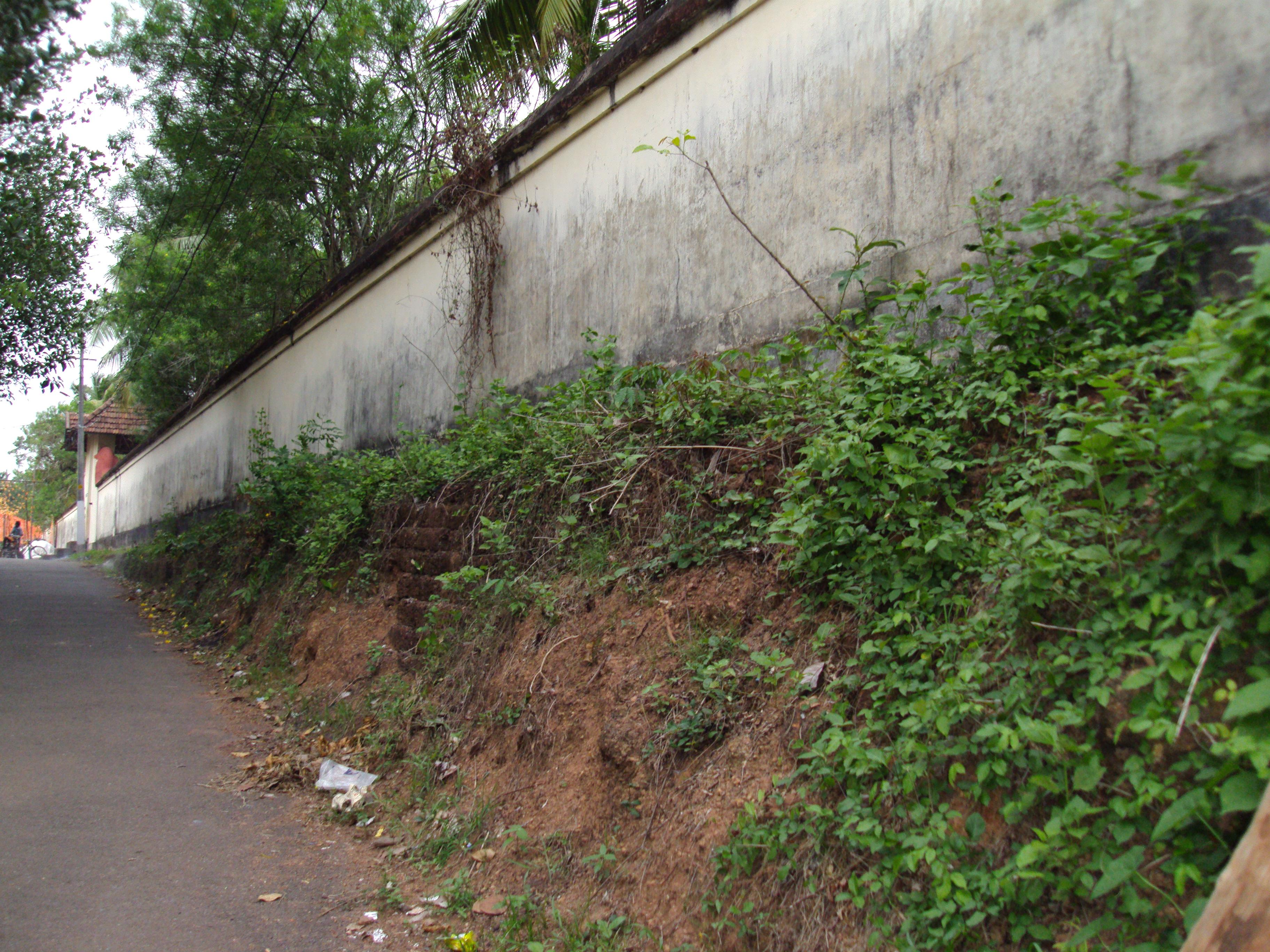 വലിയമതിൽക്കെട്ട്